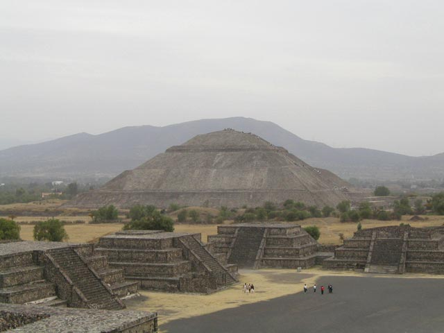 Pirámide del Sol, Teotihuacan